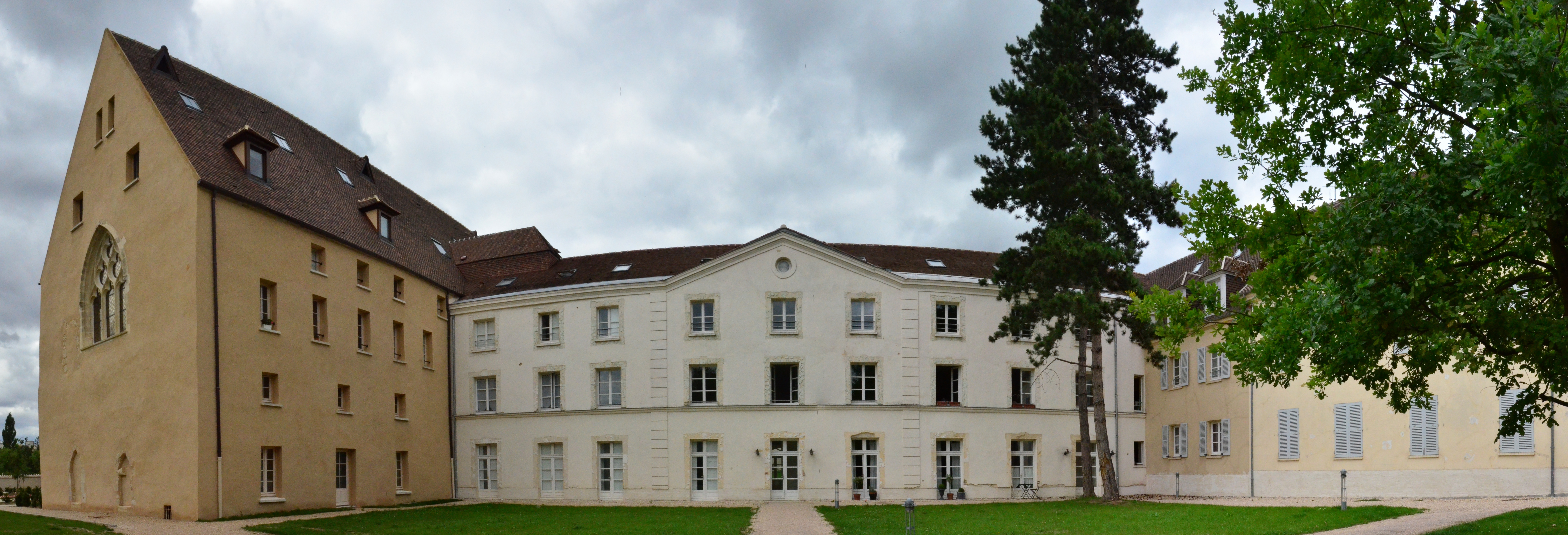 Abbaye Notre-Dame de Yerres. L'aile de droite étant plus connu sous le nom de dortoir, et le bâtiment central, la pharmacie. This building is en partie classé, en partie inscrit au titre des Monuments Historiques. .